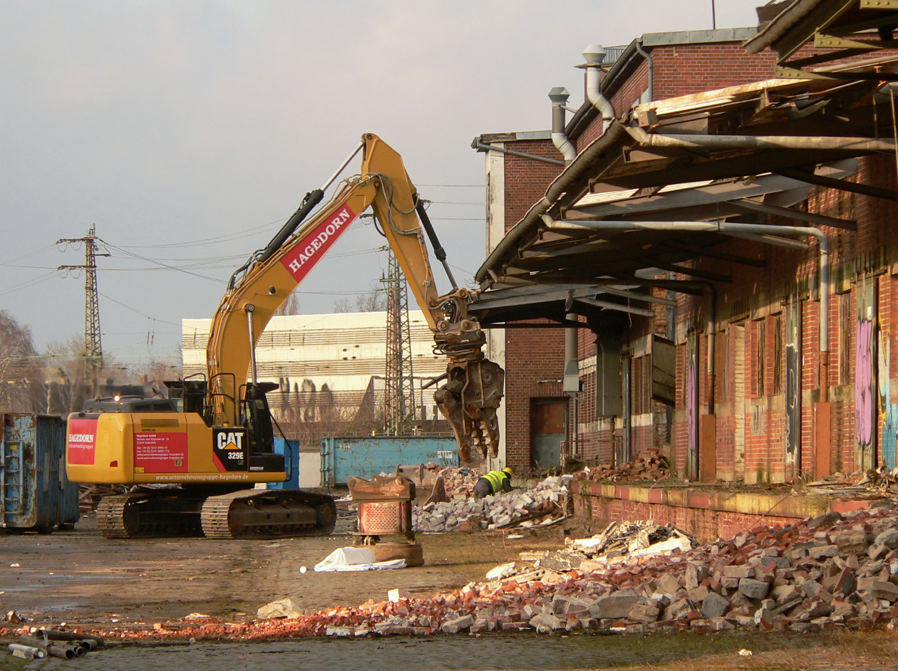 Abrissarbeiten an rückwärtigen Hallen des am Hauptgüterbahnhof Hannover